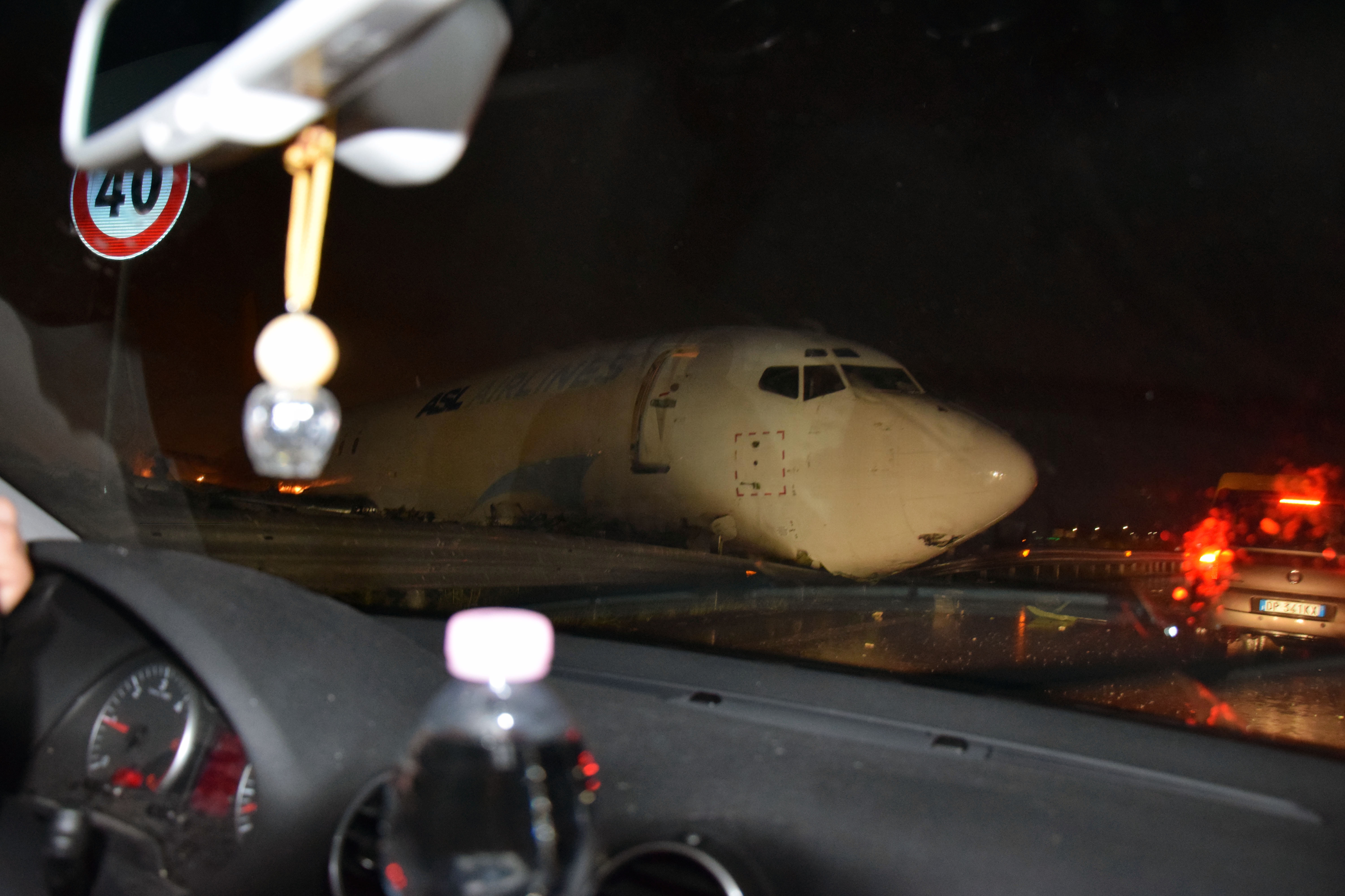 Fotografia subito dopo l'incidente del Boeing 737-476 con registrazione HA-FAX. Ore 4:12 (CEST), 5 Agosto 2016. Dimensione immagine 6000x4000. Copyright © Marco Mauri Pude